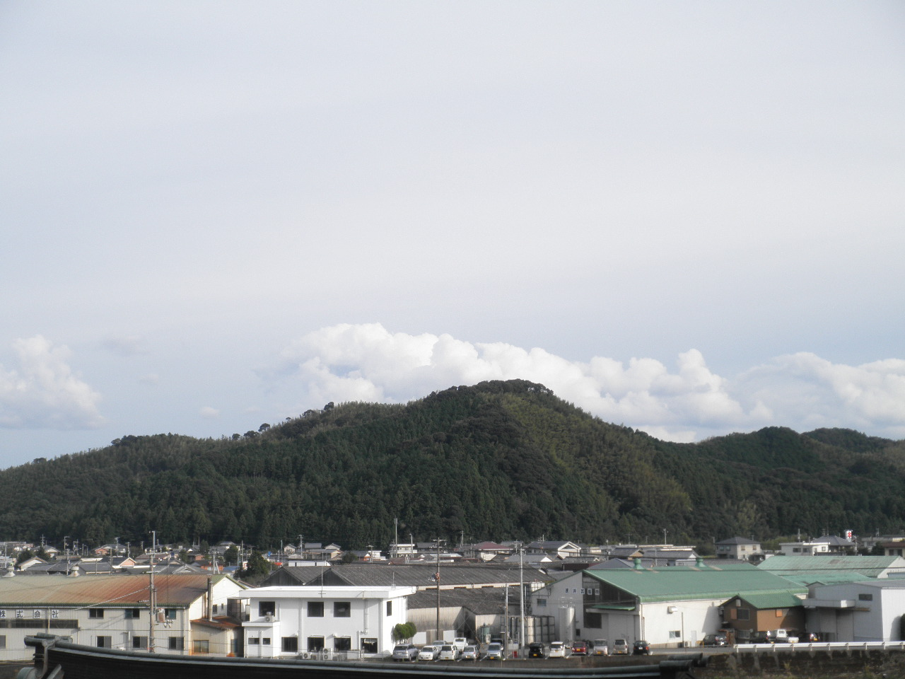 徳島県阿南市新野町遠景